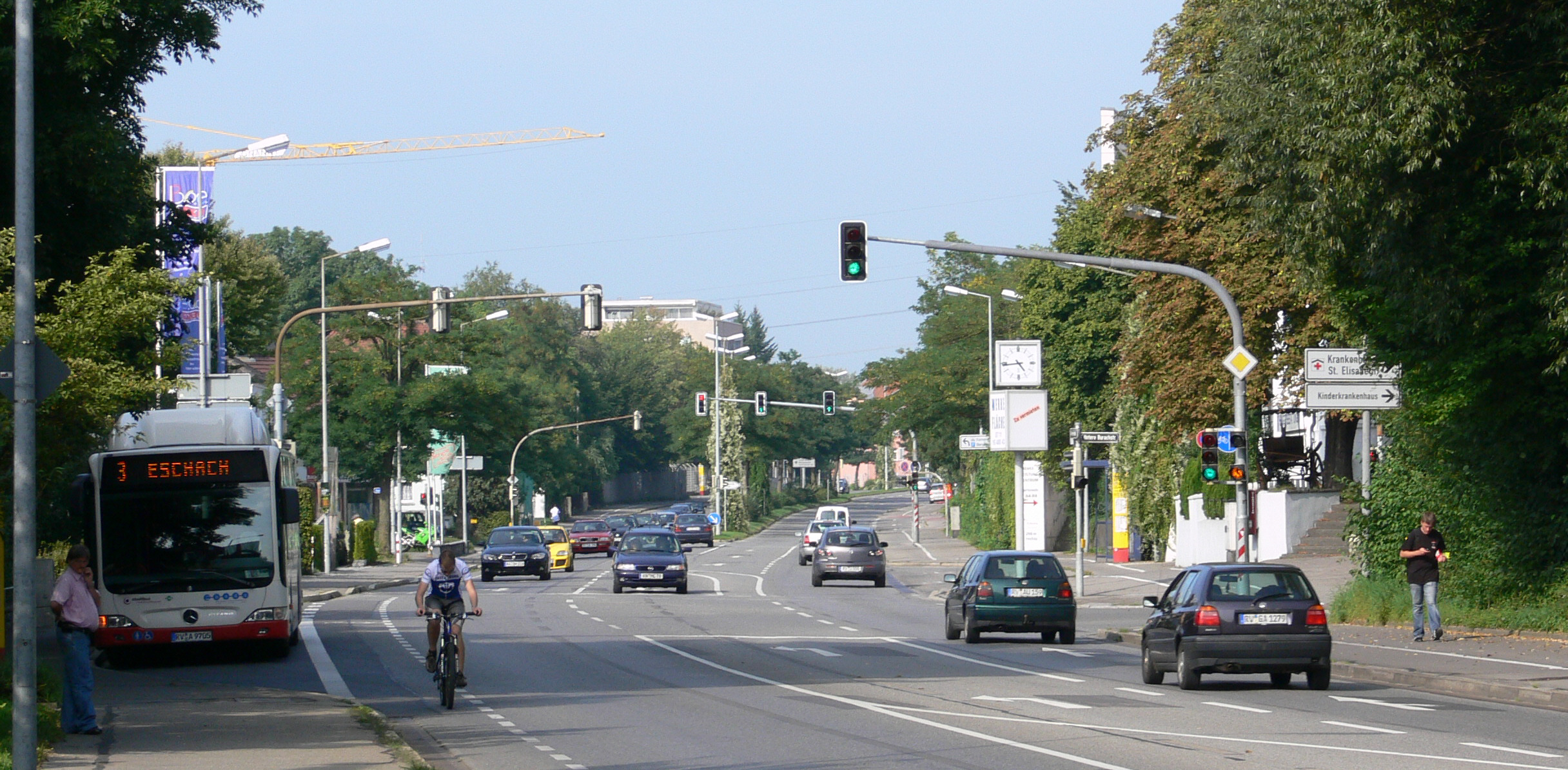 Ravensburg, Bushaltestelle "Heilig Kreuz" an der Gartenstraße, links südliche Seite, rechts nördliche Seite